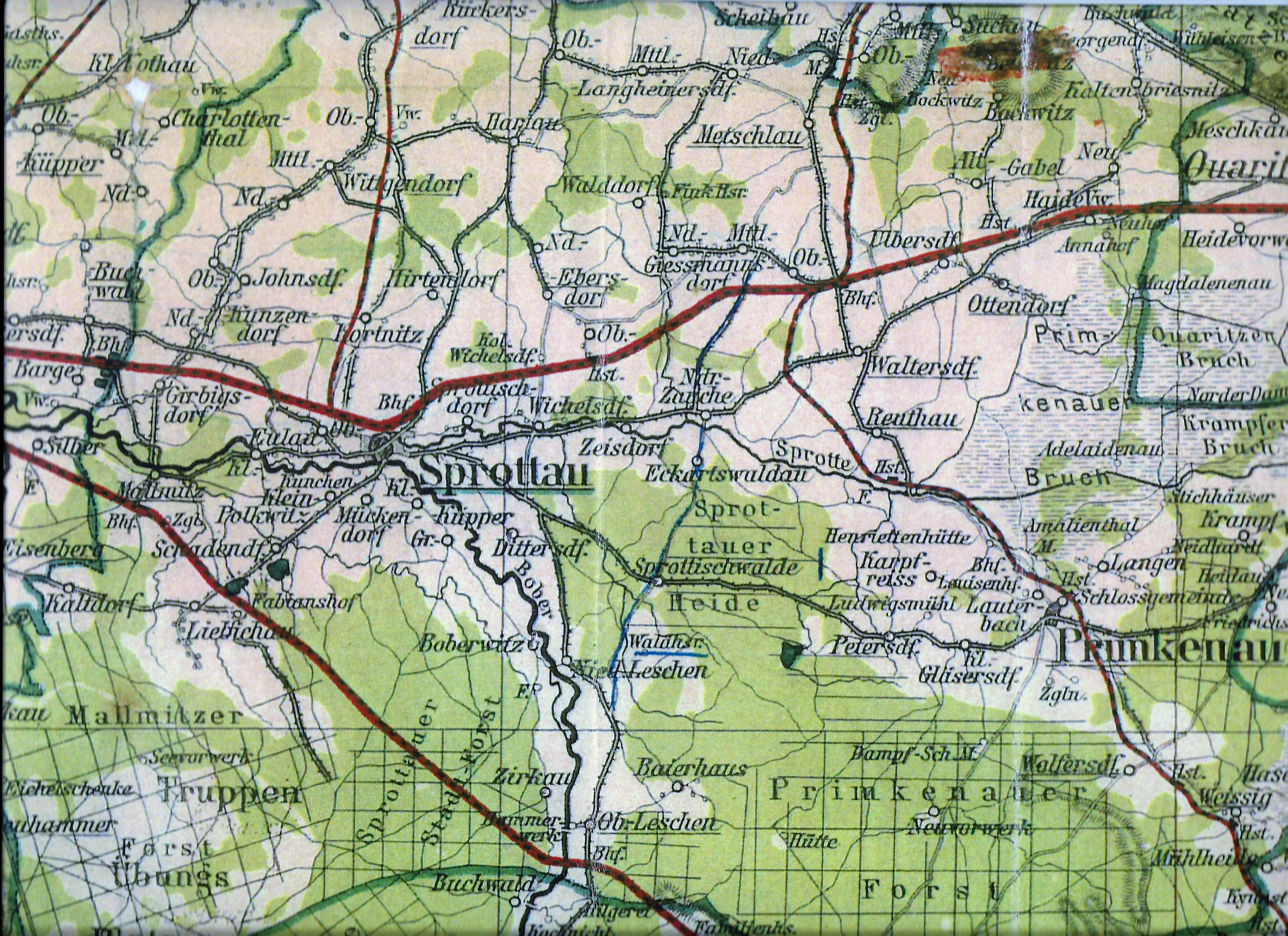 An der Stelle im Text eingefügt um die linksstehenden Dörfer mit den damaligen Ortsnamen besser einordnen zu können.